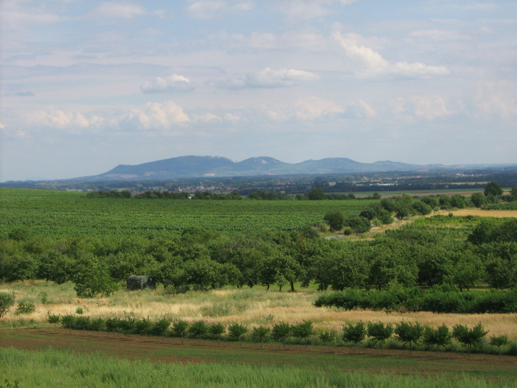 Typická silueta Pálavy v jihomoravské krajině. Pohled od Dolních Kounic. (en:) Typical silhouette of Palava hills in south-Moravian countryside. View from town Dolní Kounice.